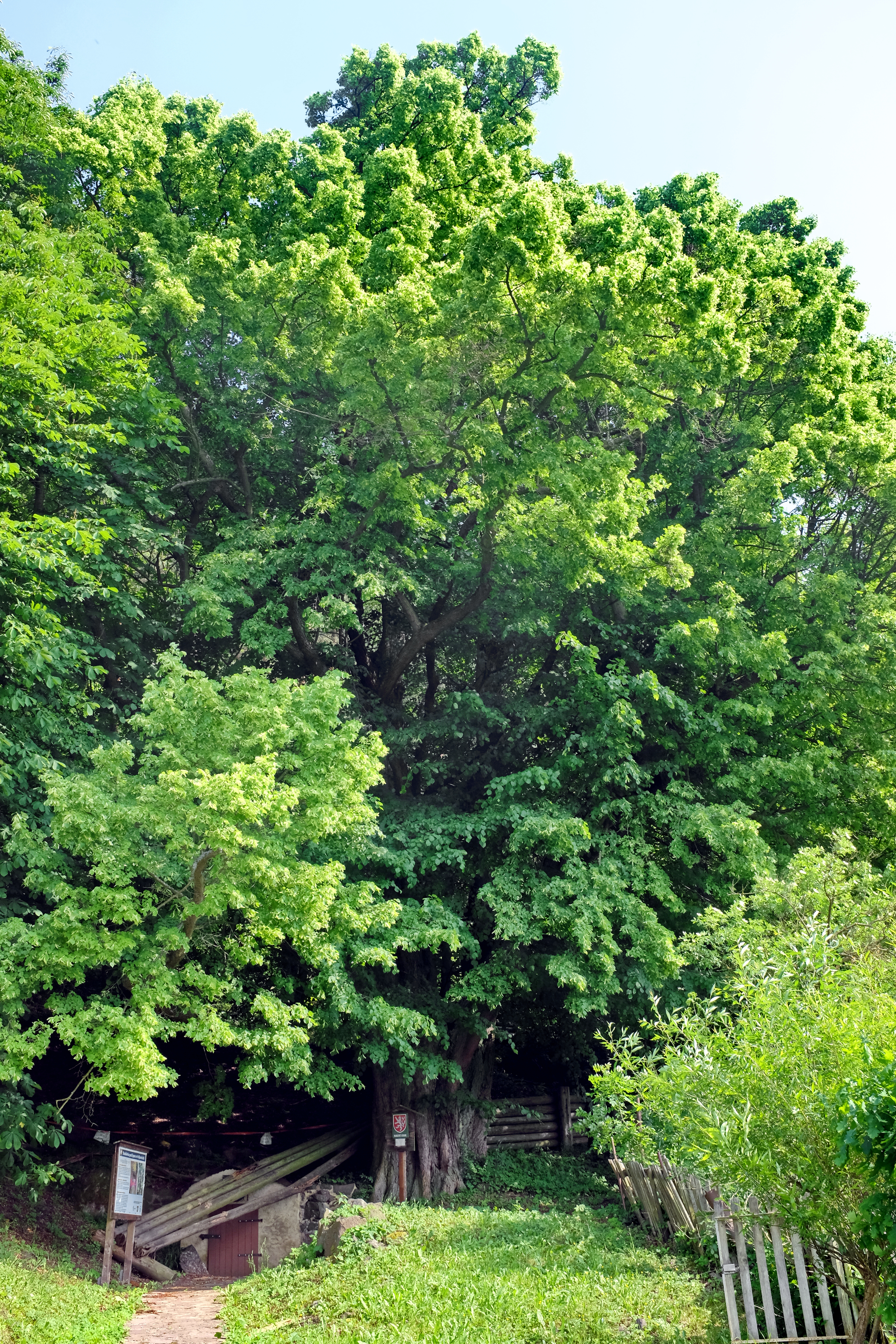 Památný strom - Vojkovická lípa - okres Karlovy Vary